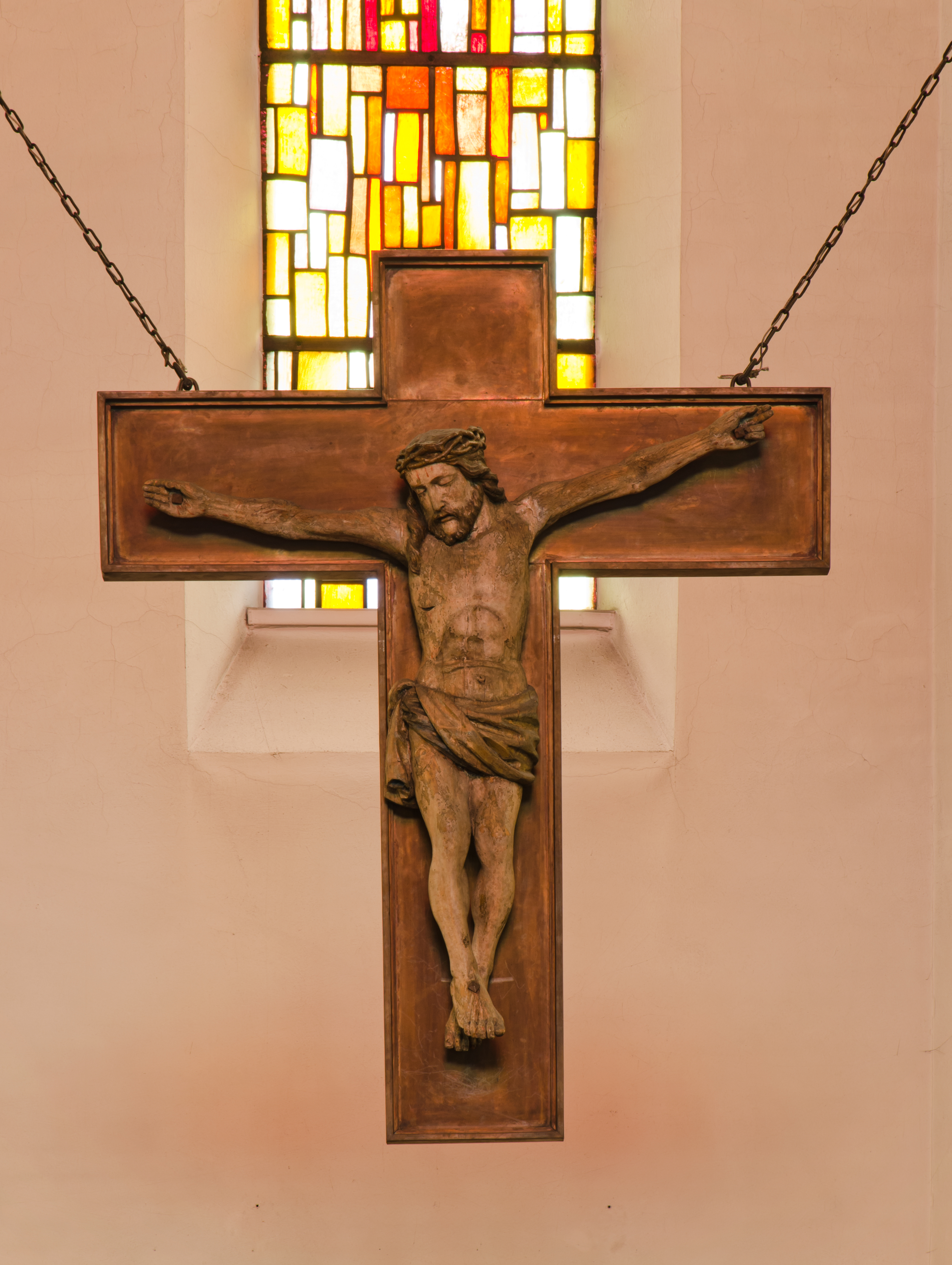 St. Joseph Wandsbek Kruzifix